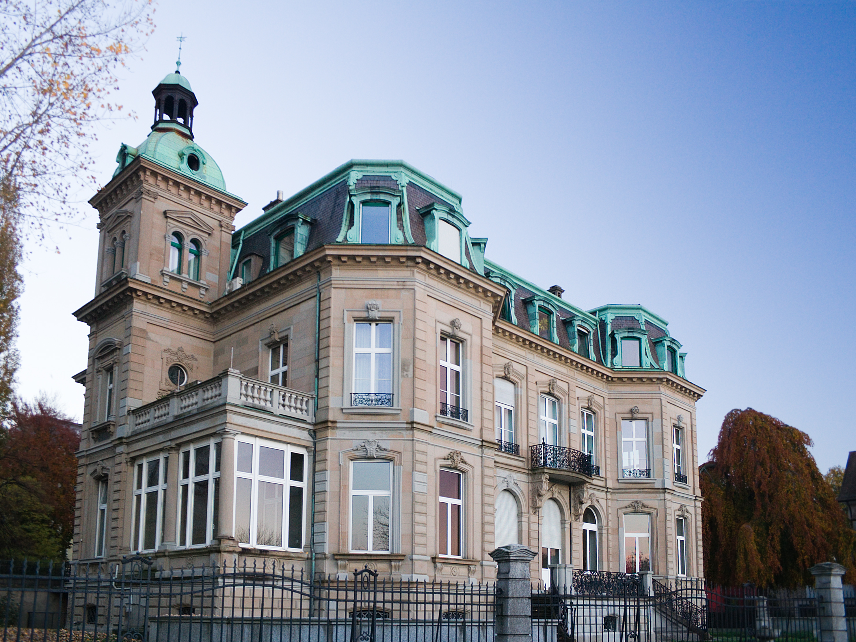 Villa Windegg an der Bellerivestr. 10 in Zürich, Schweiz vom Architekt Ferdinand StadlerAufnahme mit Polfilter